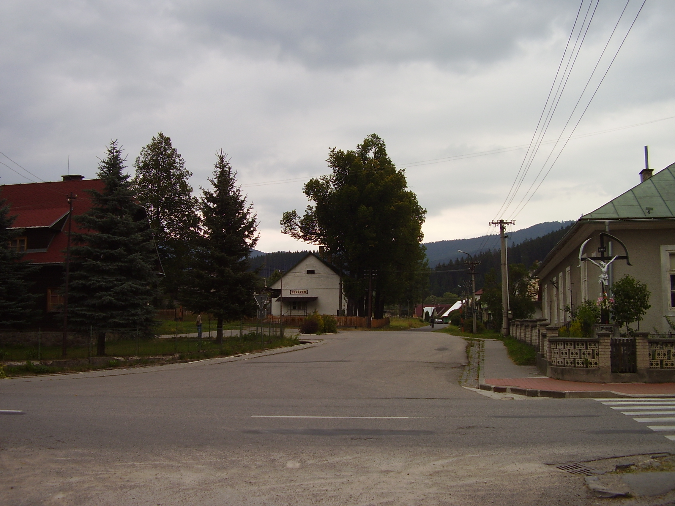 Michalová, okres Brezno, Slovakia